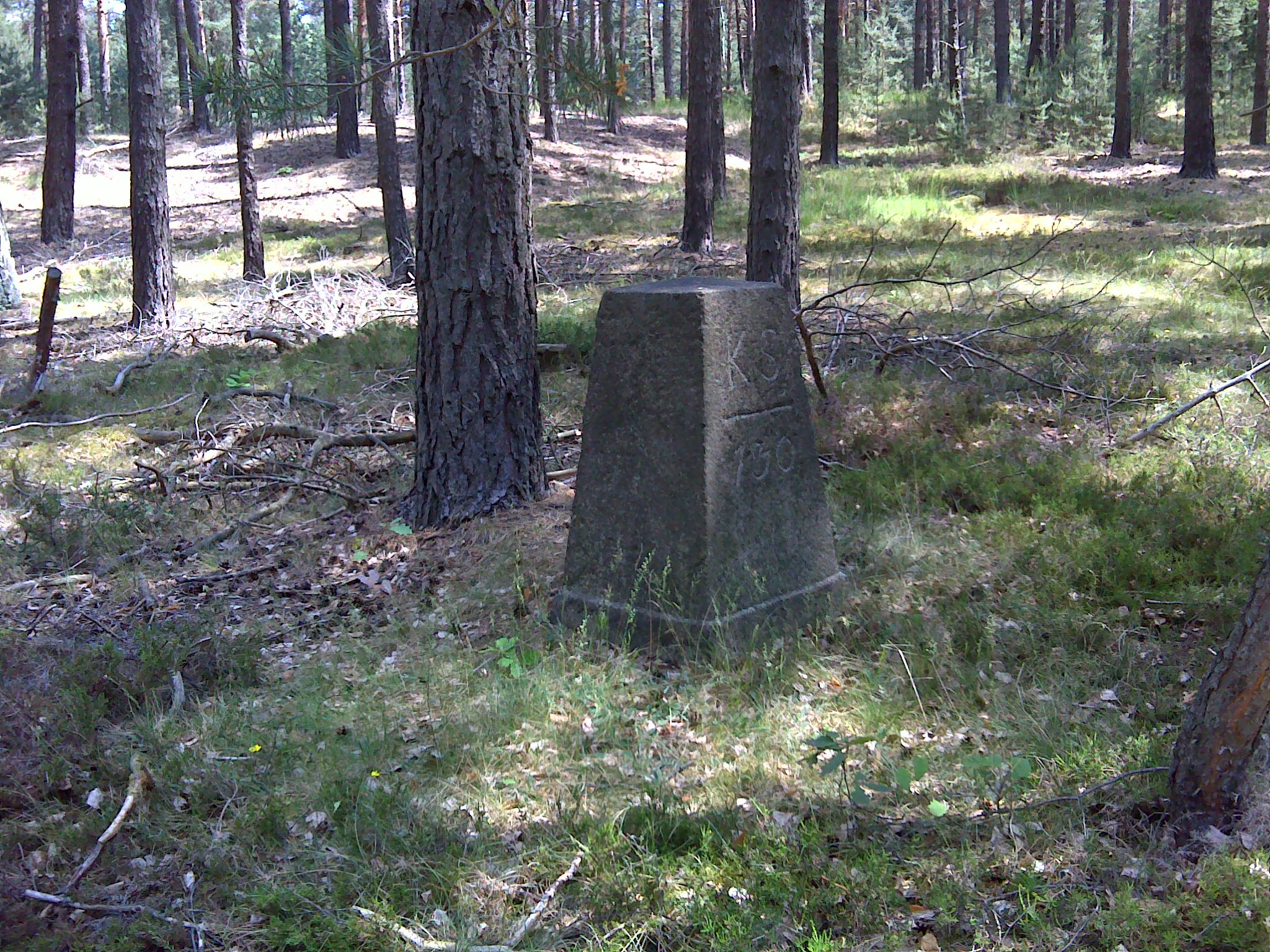 Historischer Grenzstein Nr. 130 der sächsisch-preußischen Grenze 1815 Hornjoserbsce: Historiski saksko-pruski měznik čo. 130 w holi wuchodnje Njedźichowa